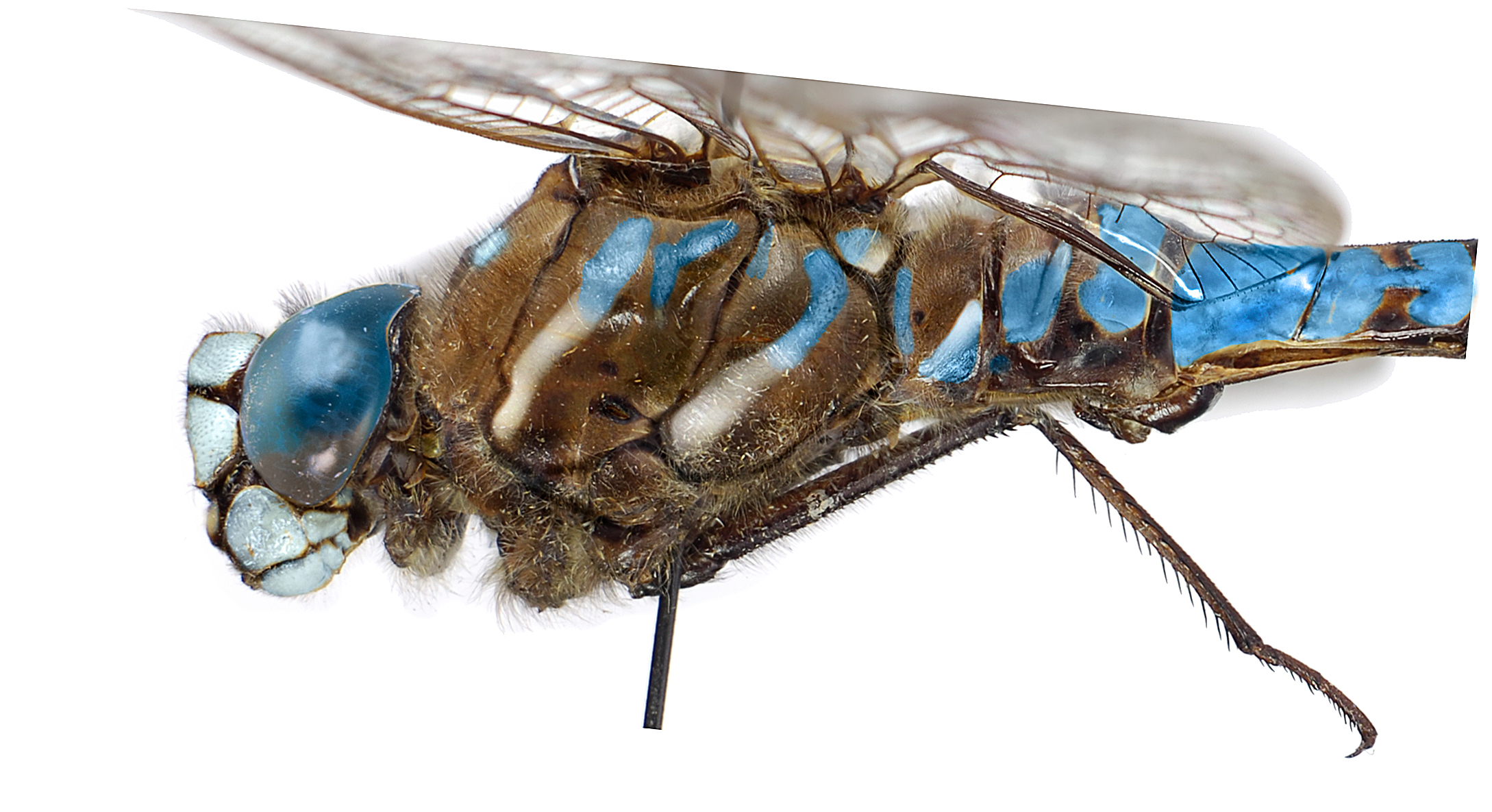 Aeshna caerulea (male), lateral view